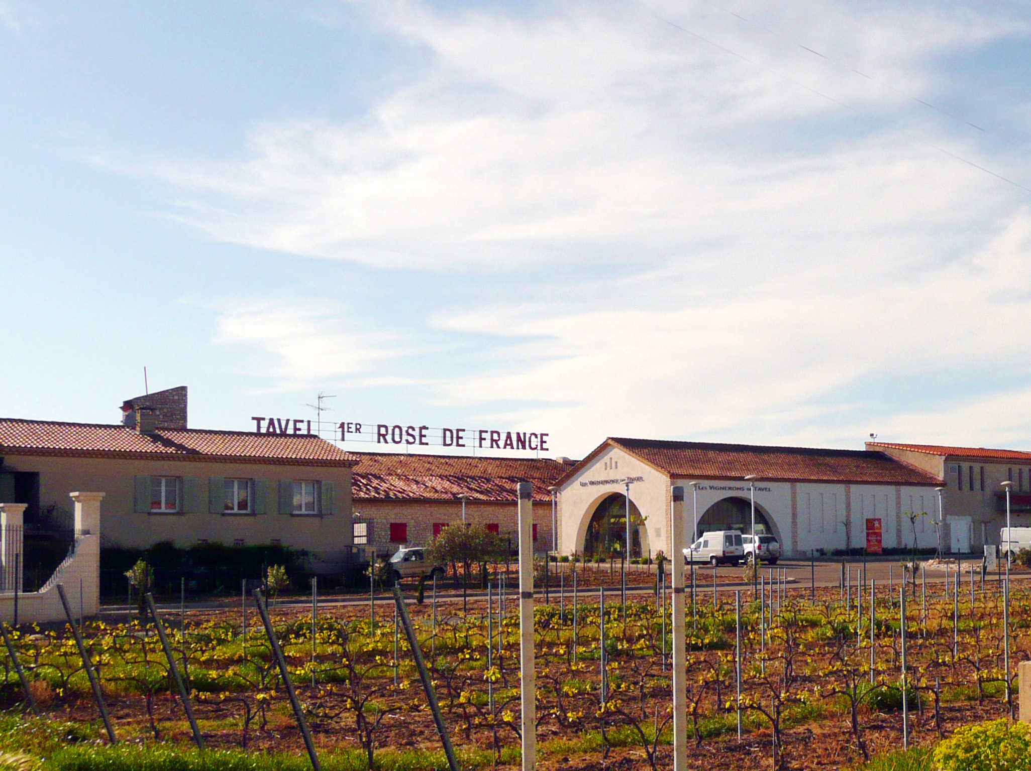 Tavel.